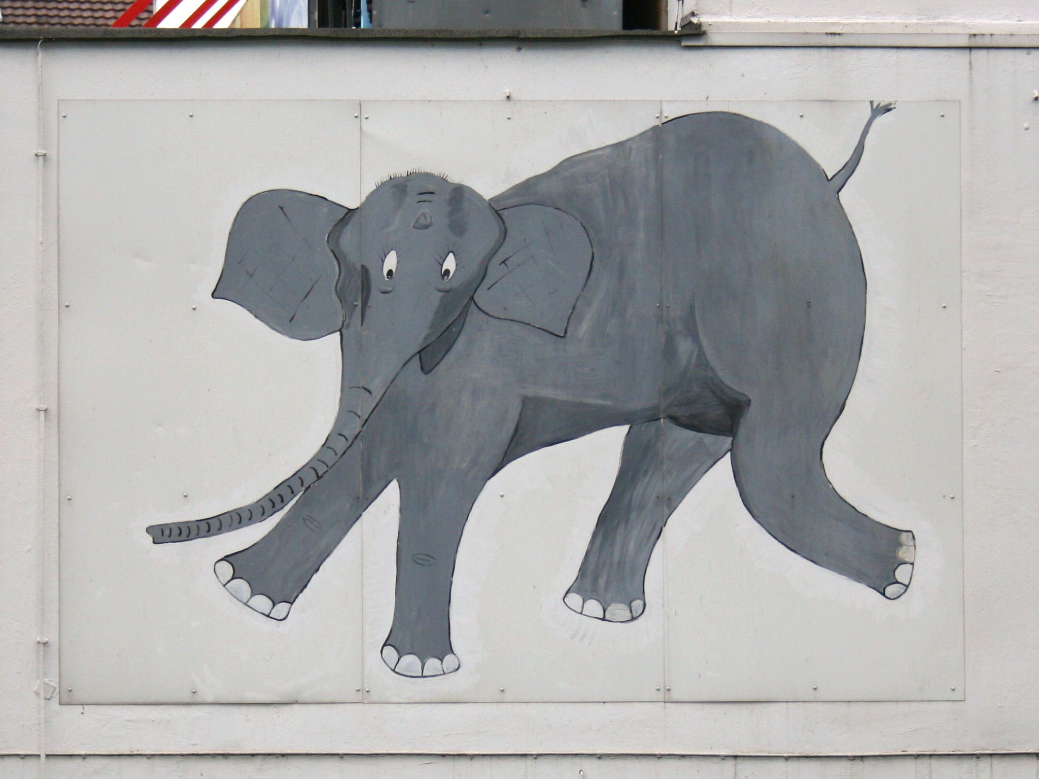 Tuffi mural in Wuppertal